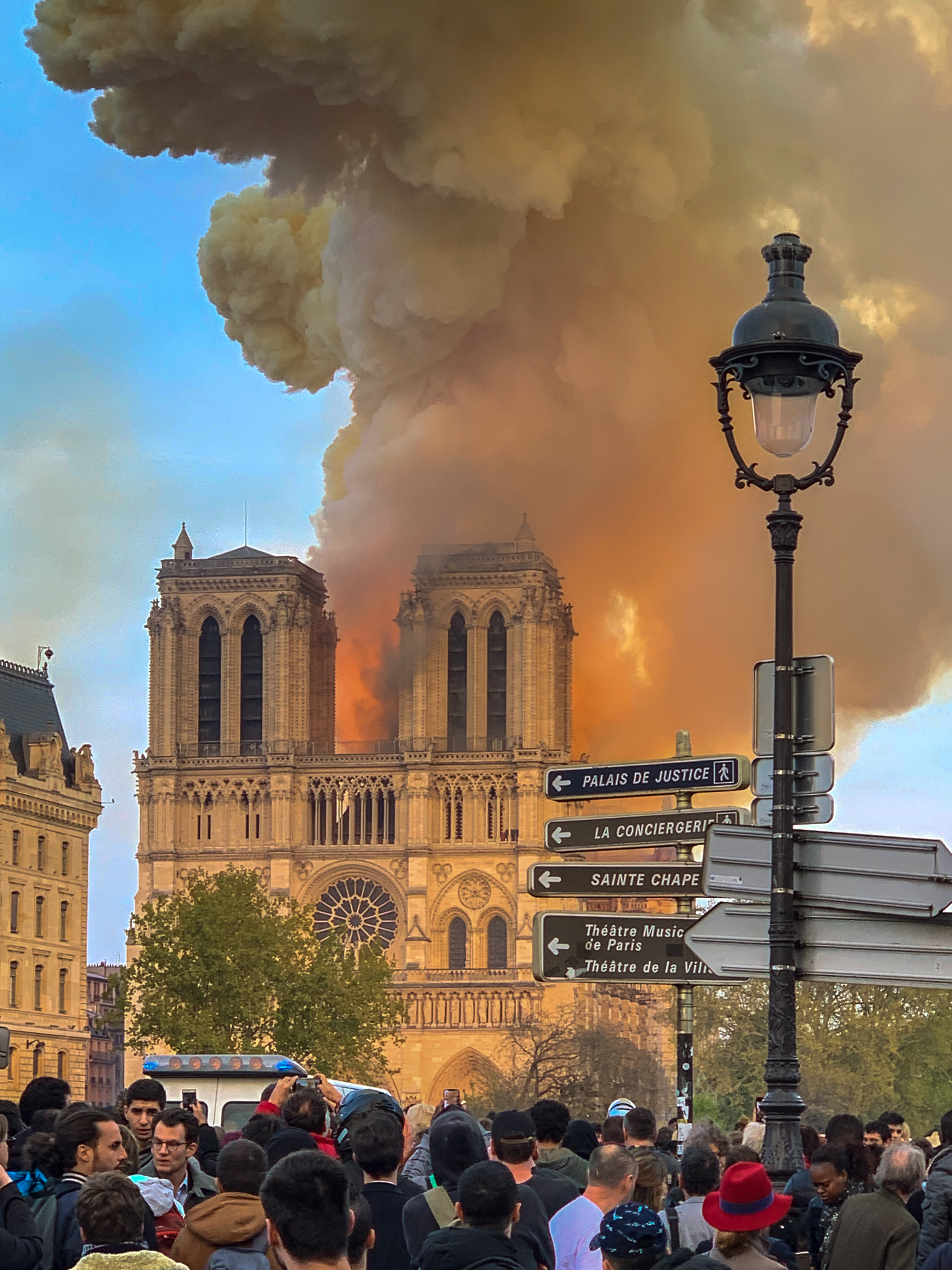 Notre Dame de Paris, brandend. 15 april 2019